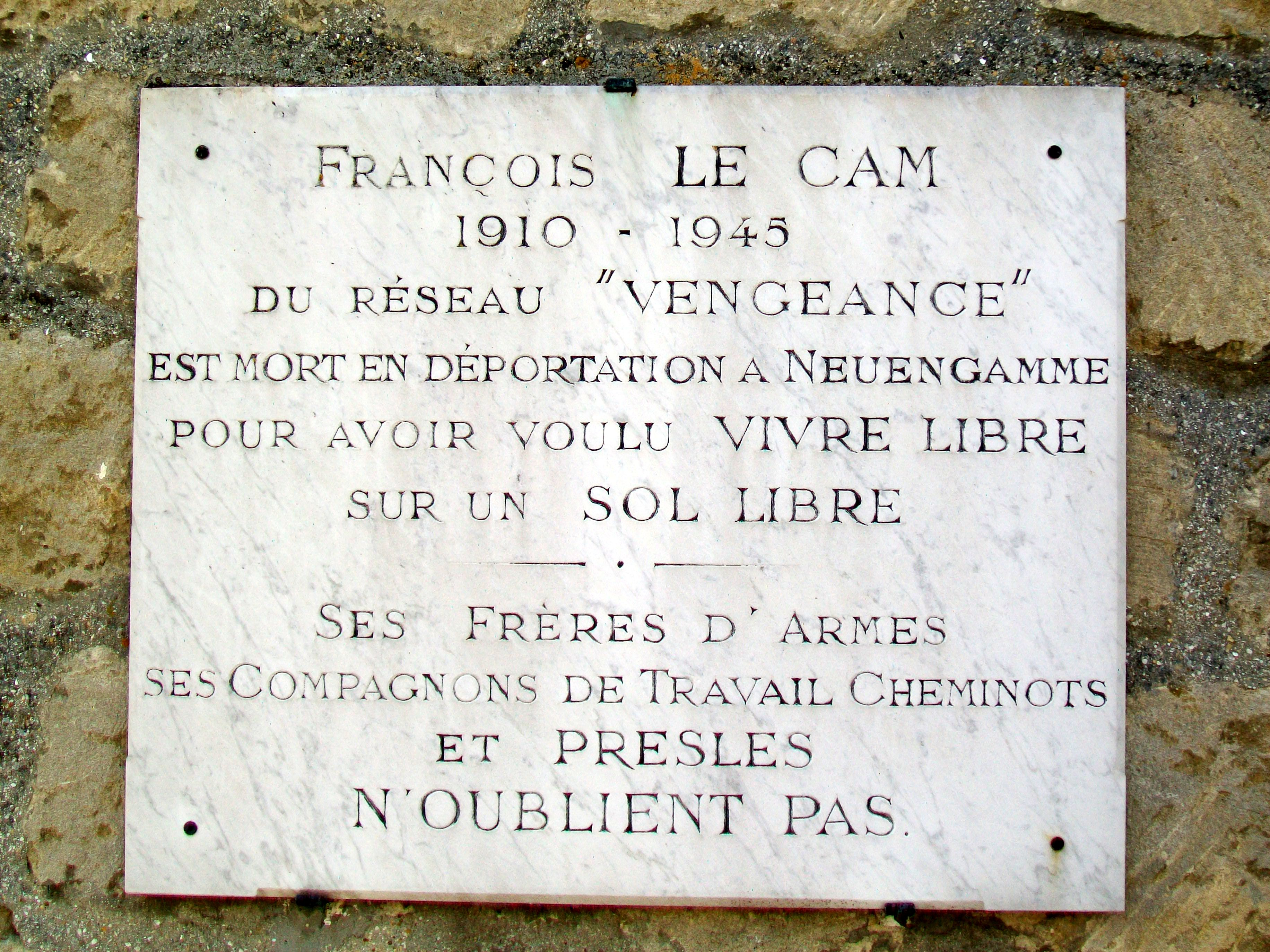 Plaque en l'honneur du résistant François Le Cam, place des martyrs de la Libération.